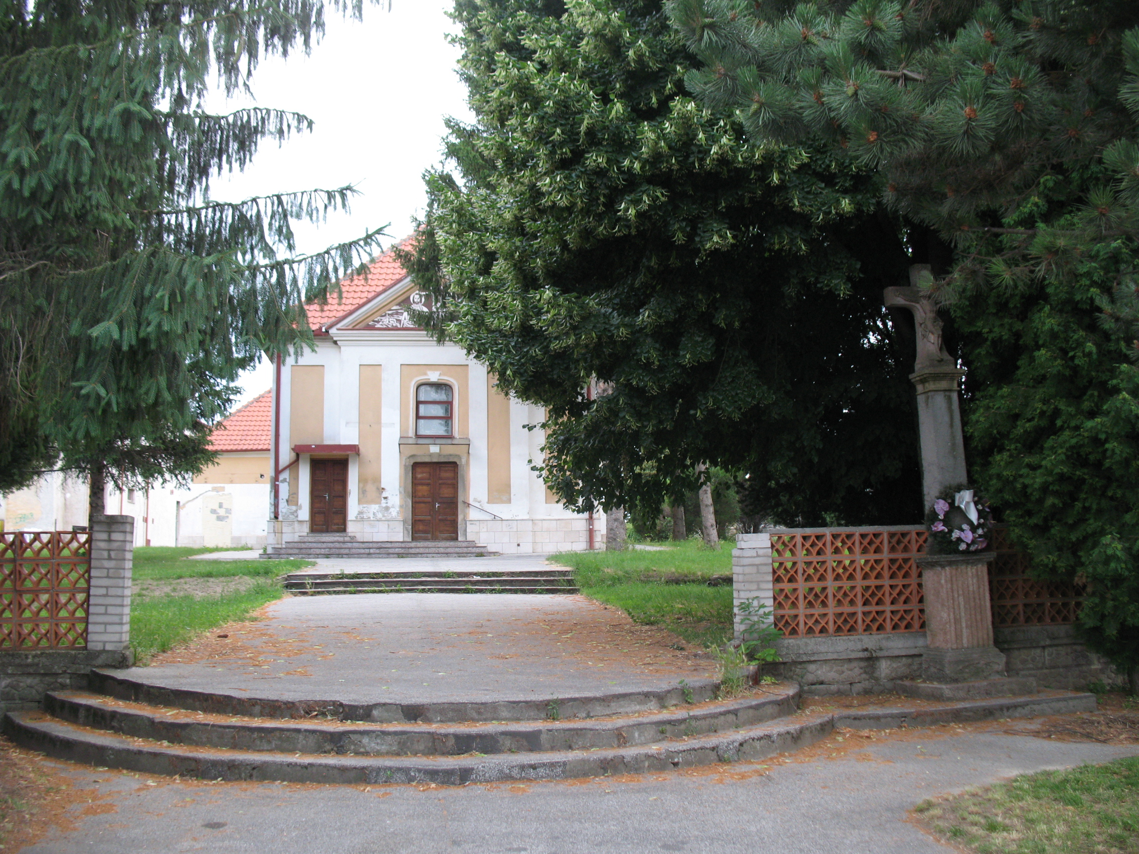 Vágpatta